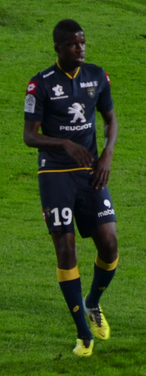 Olympique de Marseille - FC Sochaux, 10 Nov 2013